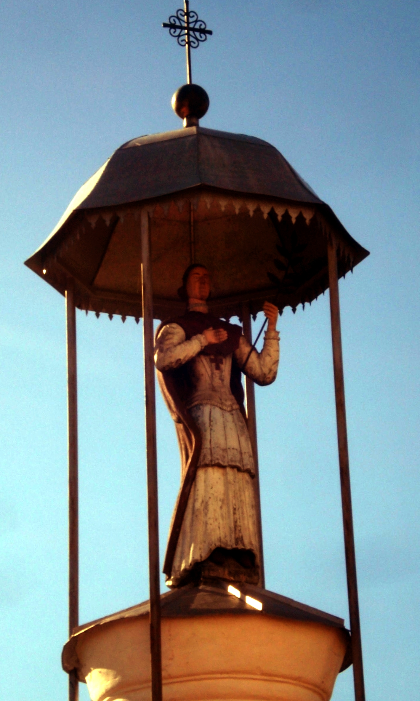 Статуя святой Агаты во дворе костёла Пресвятой Троицы в ЛишкявеLietuvių: Šv. Agotos statula Liškiavos Švč. Trejybės bažnyčios šventoriuje